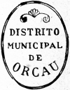 Escut antic d'Orcau (Isona i Conca Dellà, Pallars Jussà)